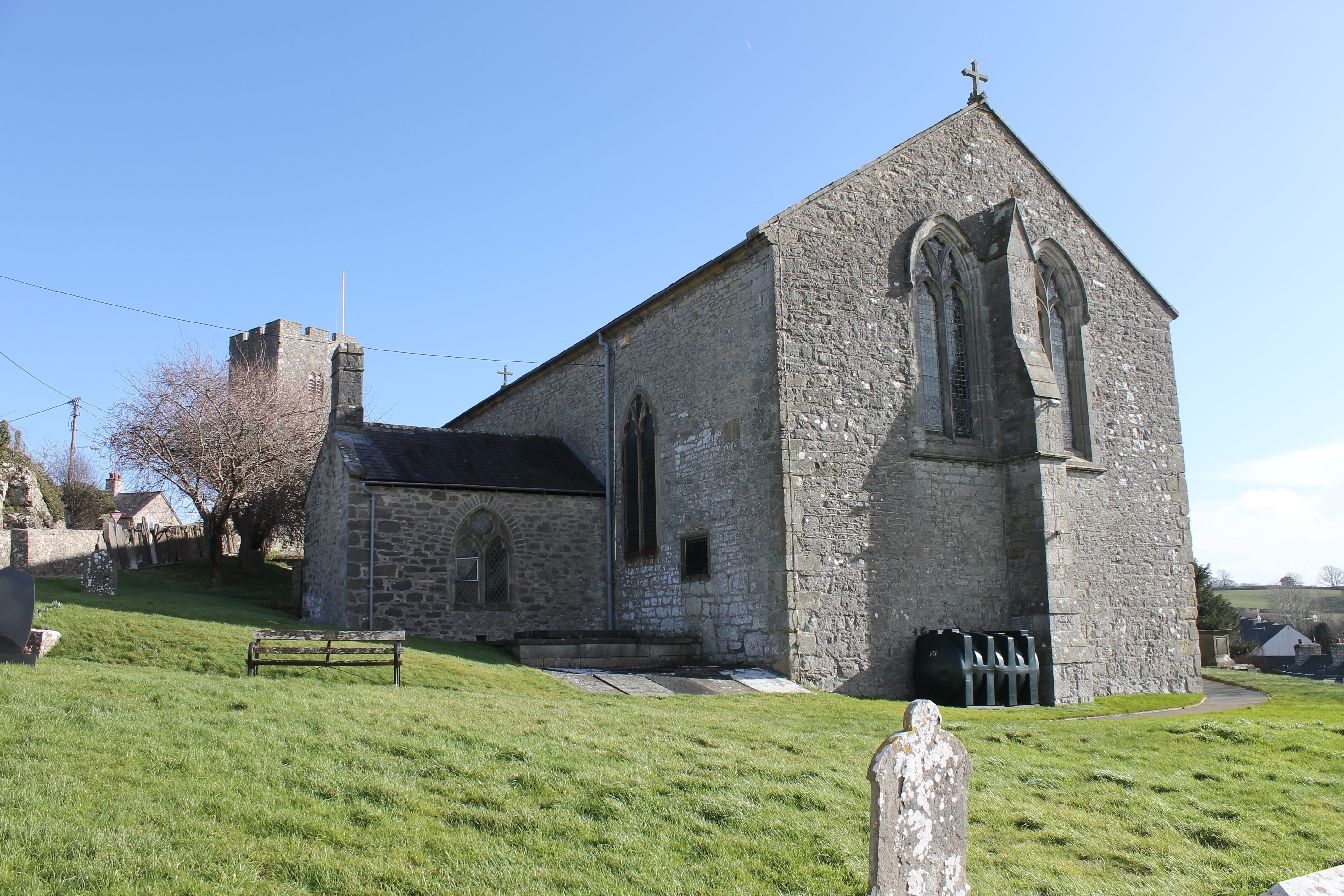 Eglwys Saint Sadwrn Henllan. Gradd: II*.